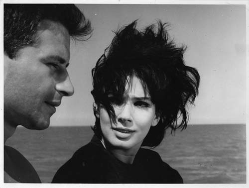 Graciela Borges junto a Alberto Argibay en Circe